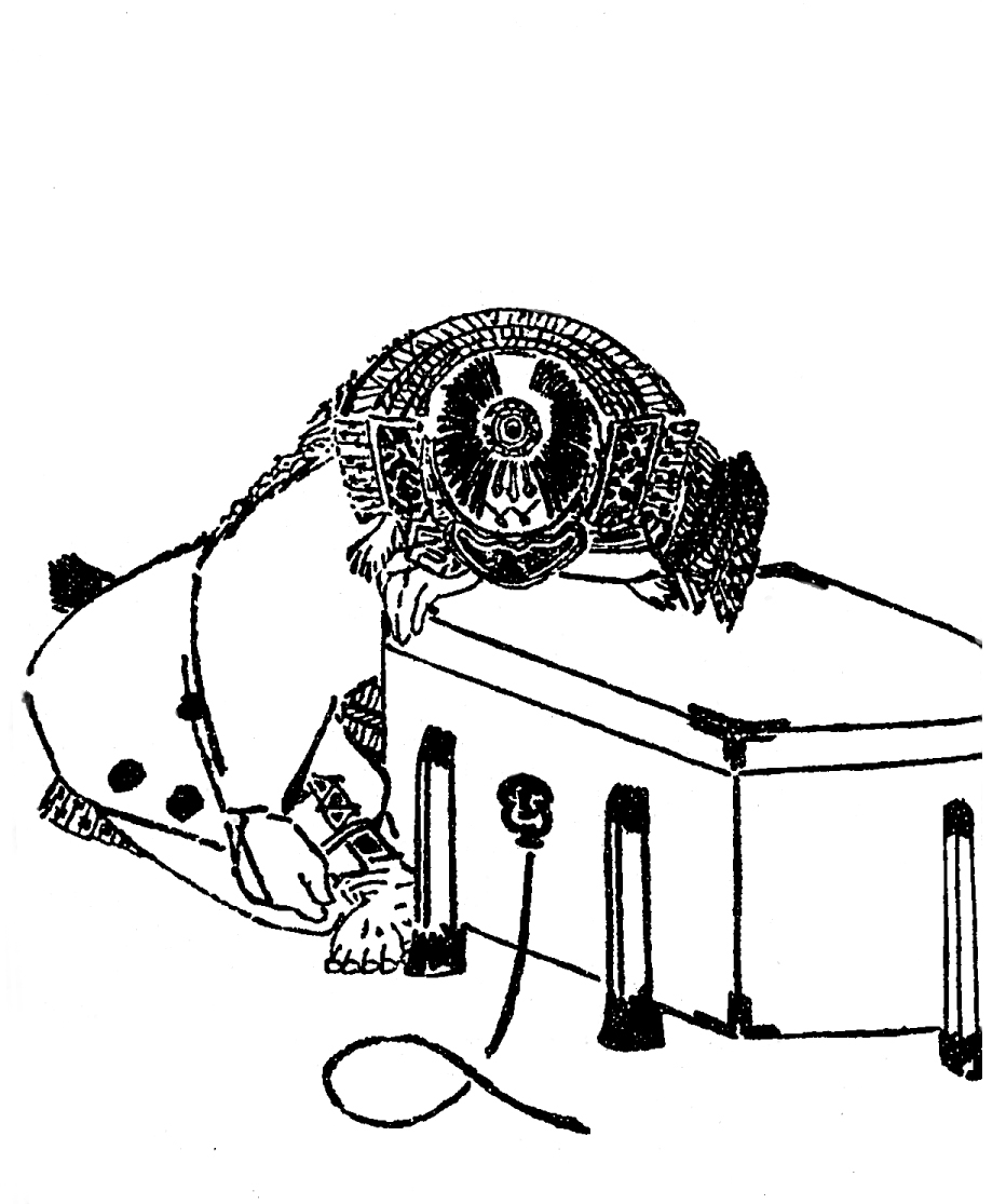 小山朝政、平安時代末期 - 鎌倉時代初期の武将。／江戸時代『前賢故実』より。画：菊池容斎